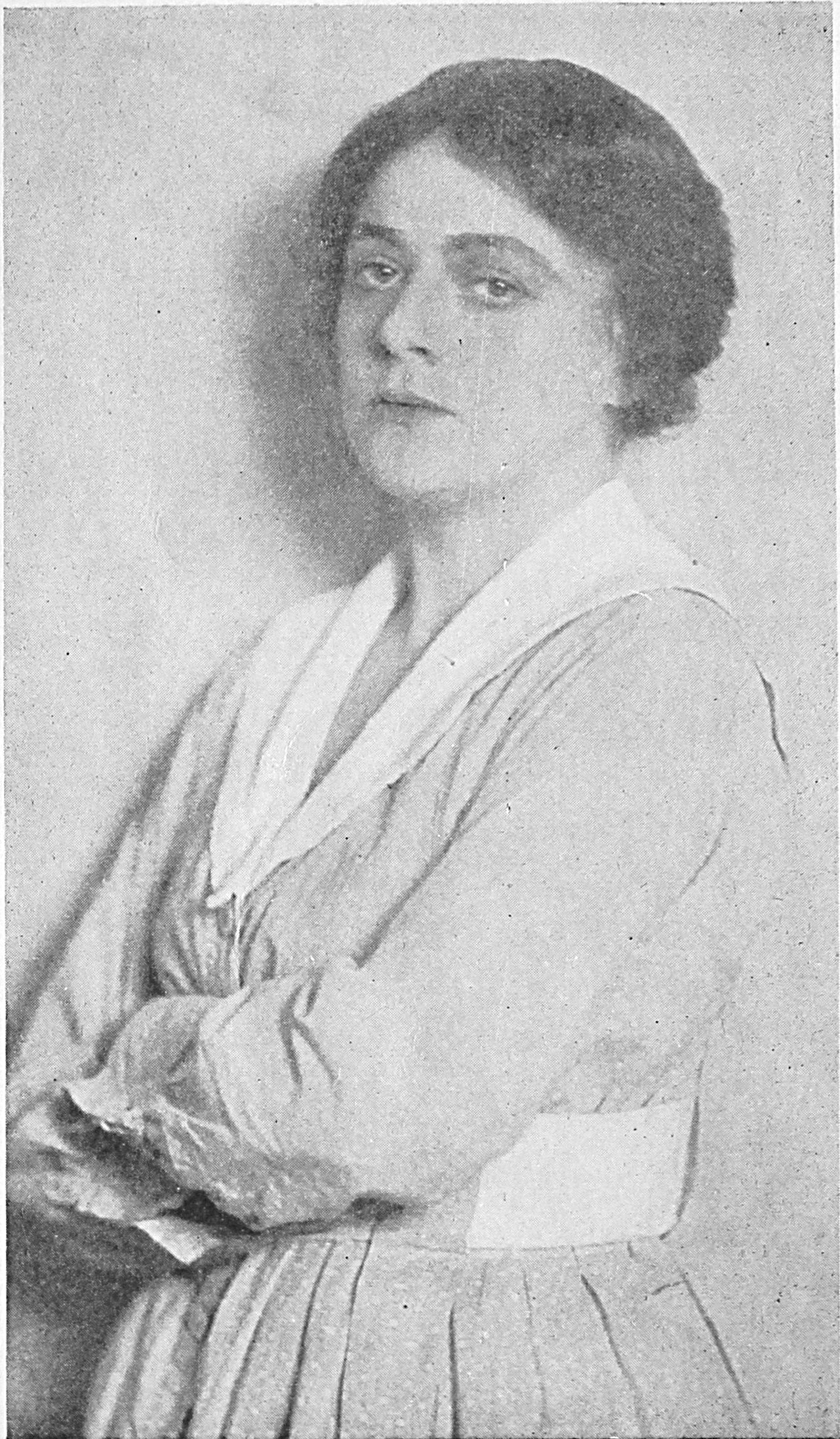 Den svenska skådespelerskan Karin Molander som Elna Hall i Ernst Didrings komedi Edna Hall på Intima Teatern i Stockholm 1918.